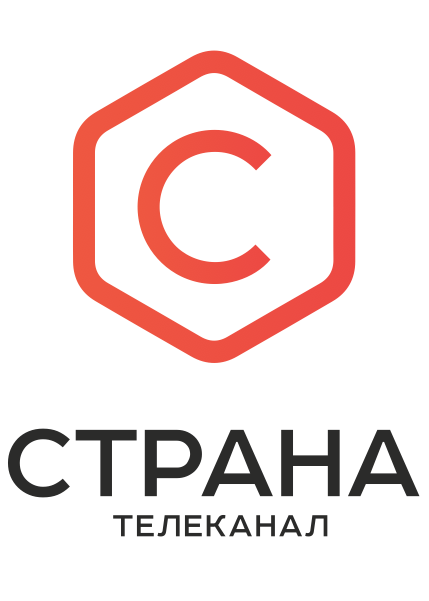 Логотип телеканала «Страна» с 5 сентября 2016 года